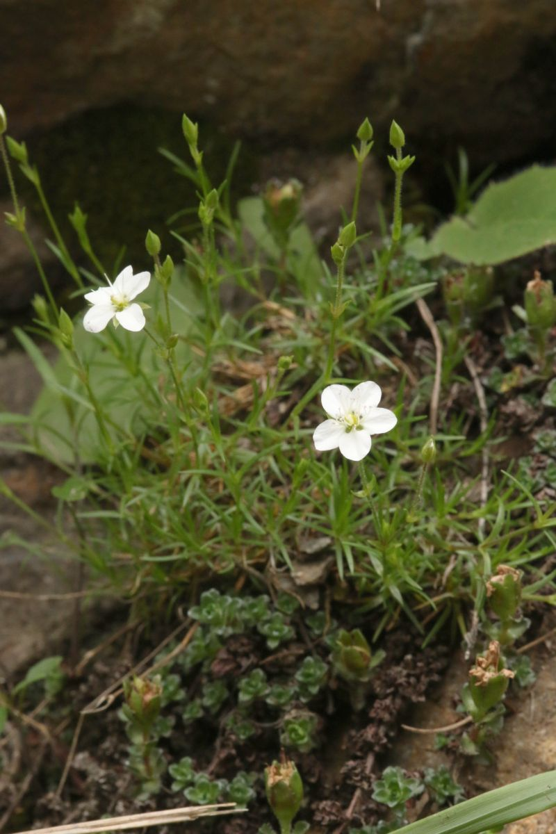 Kvetoucí kuřička krkonošská (Minuartia corcontica), Čertova zahrádka